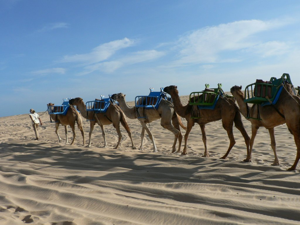 Dromedários em Genipabu, RN, Brasil. Camelus dromedarius in Genipabu, Natal, Brazil.